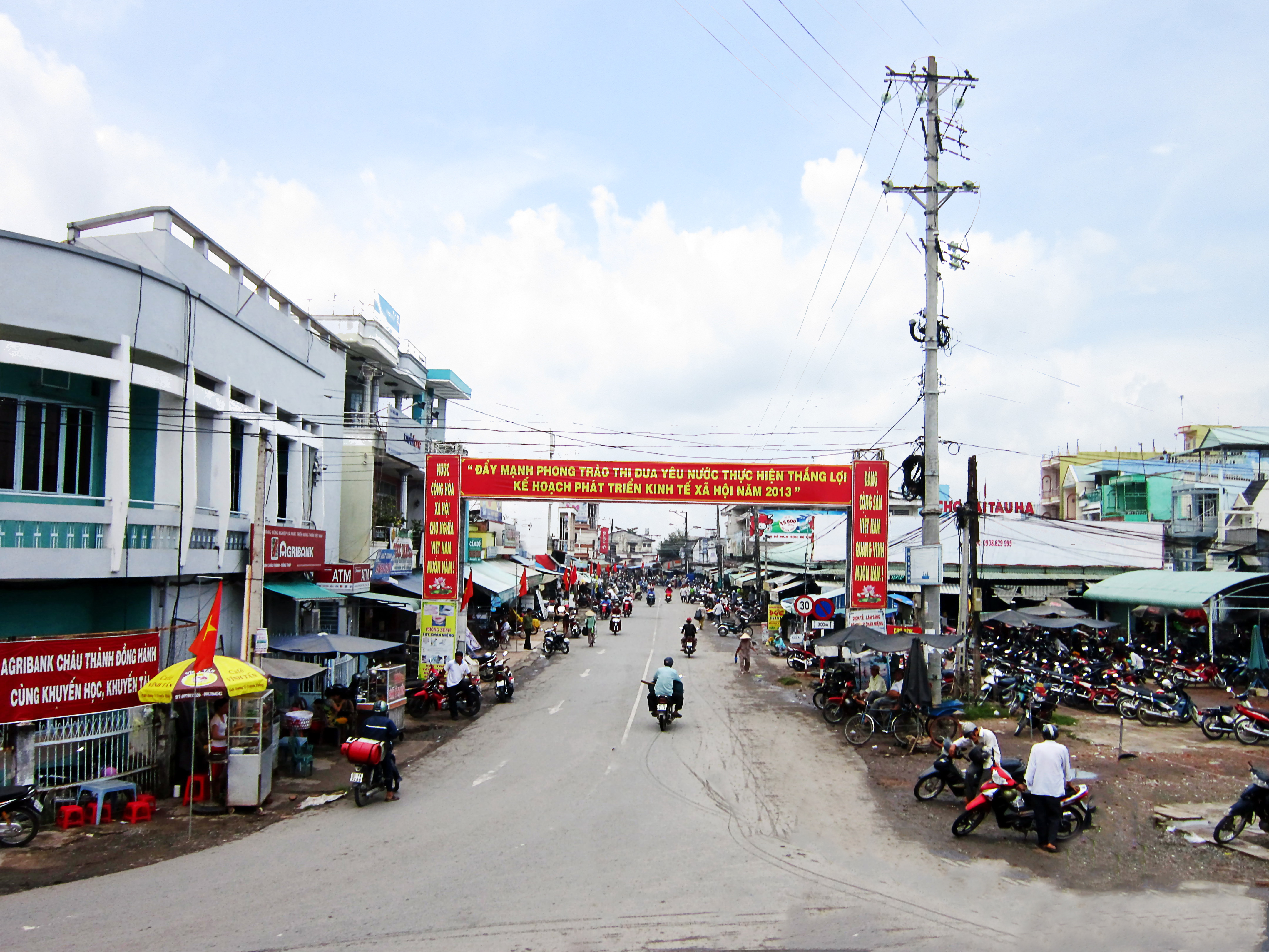 Chợ thị trấn Cái Tàu Hạ, huyện Châu Thành, tỉnh Đồng Tháp, Việt Nam.